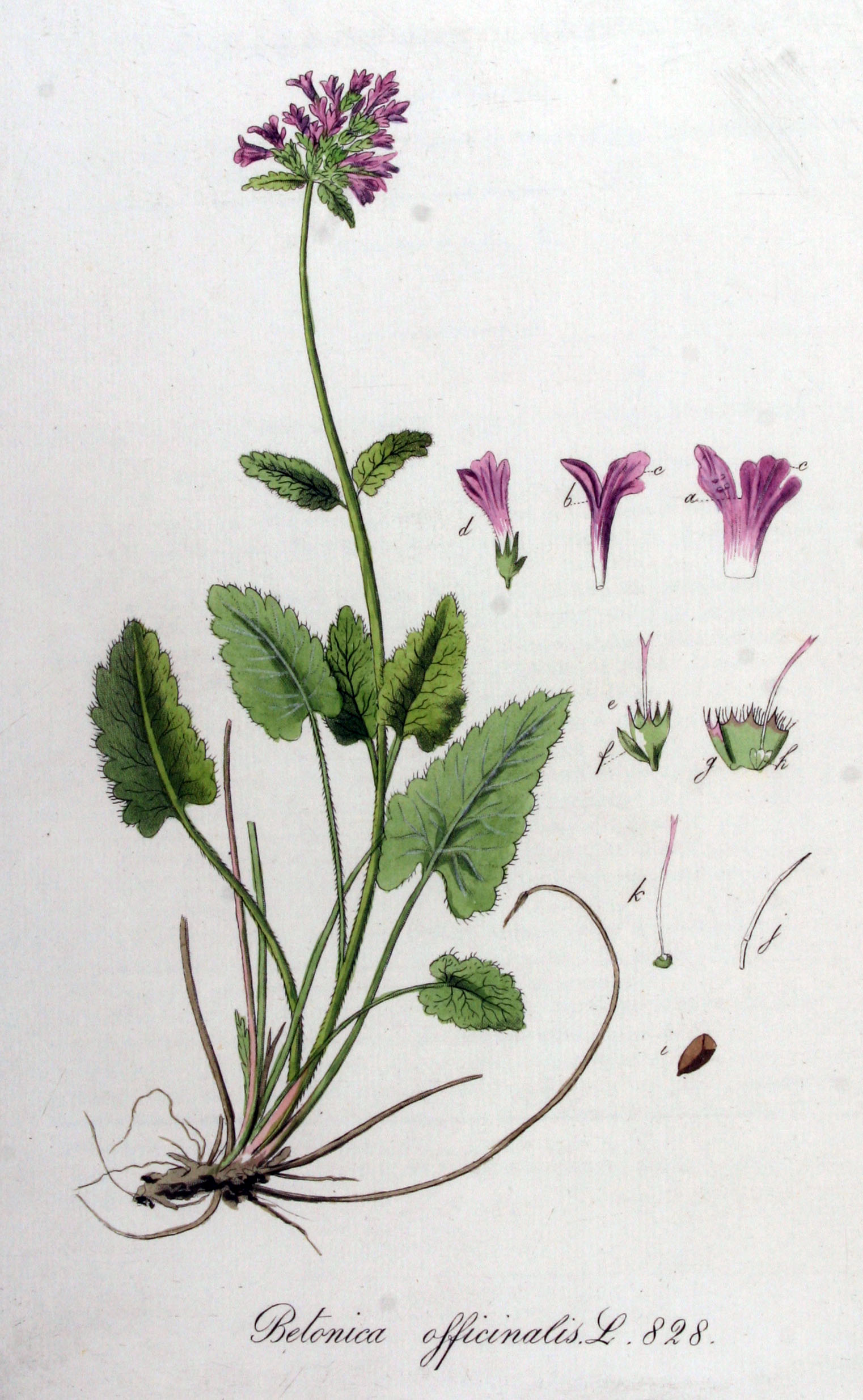 Stachys officinalis (L.) Trev. (Syn. Betonica officinalis L.)